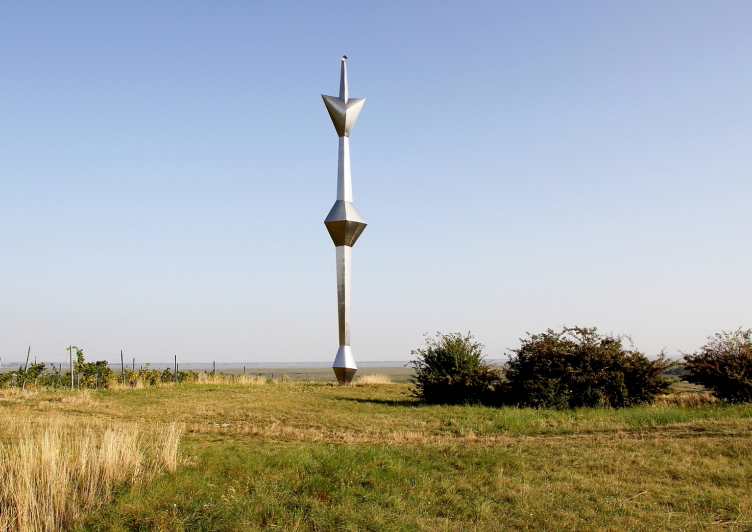 Eine Stahlplastik von Wander Bertoni, die er auf einer Anhöhe in der burgenländischen Gemeinde Winden am See Anfang der 1960er Jahre errichtete.